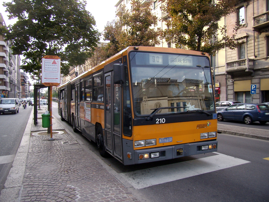 Vettura filoviaria 210 dell'ATM di Milano, in servizio sulla linea 90 (circolare destra), in via Tonale